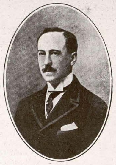 Marqués de Urquijo, por Franzen.